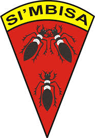 lambang simbisa